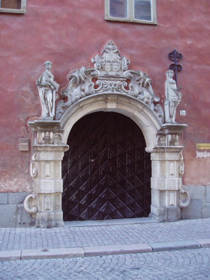 Ryningska palatset, portal, Gamla stan, Stockholm